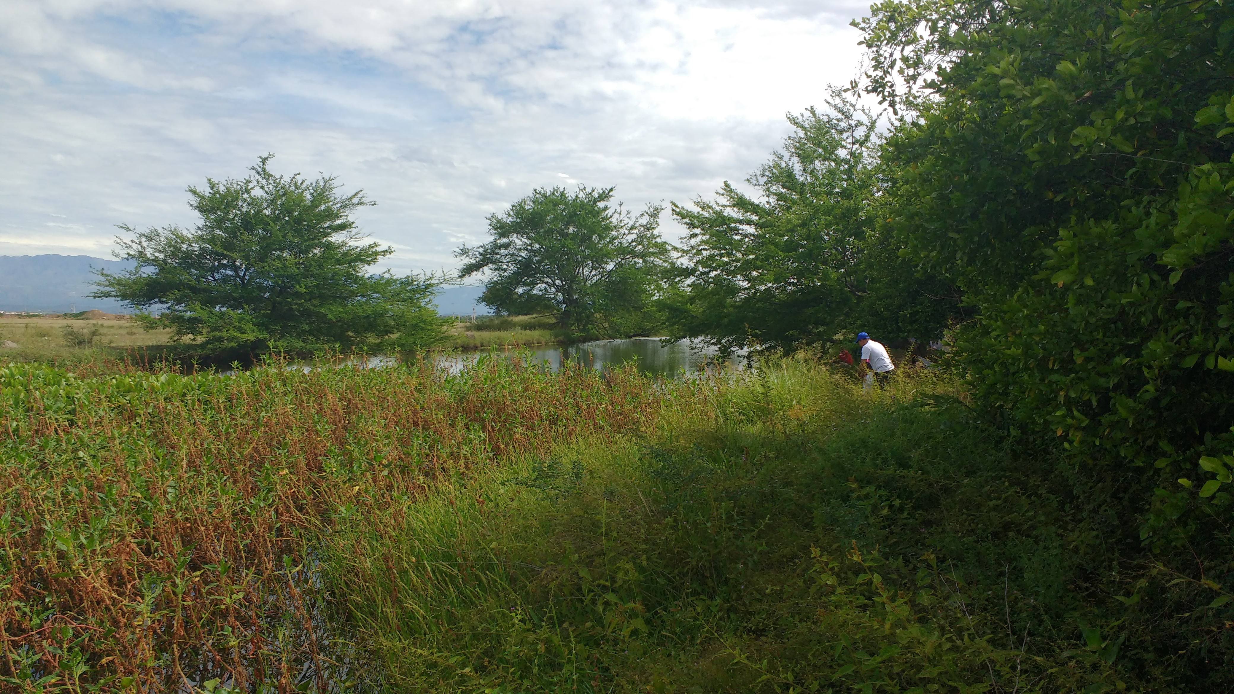 Esta ubicado al oriente de la ciudad de Neiva, lo conforman las fuentes hídricas La Barrialosa y El Chaparro. Su nombre se debe al árbol que se encuentra allí, registra 100 especies de aves, decenas de especies vegetales y animales.